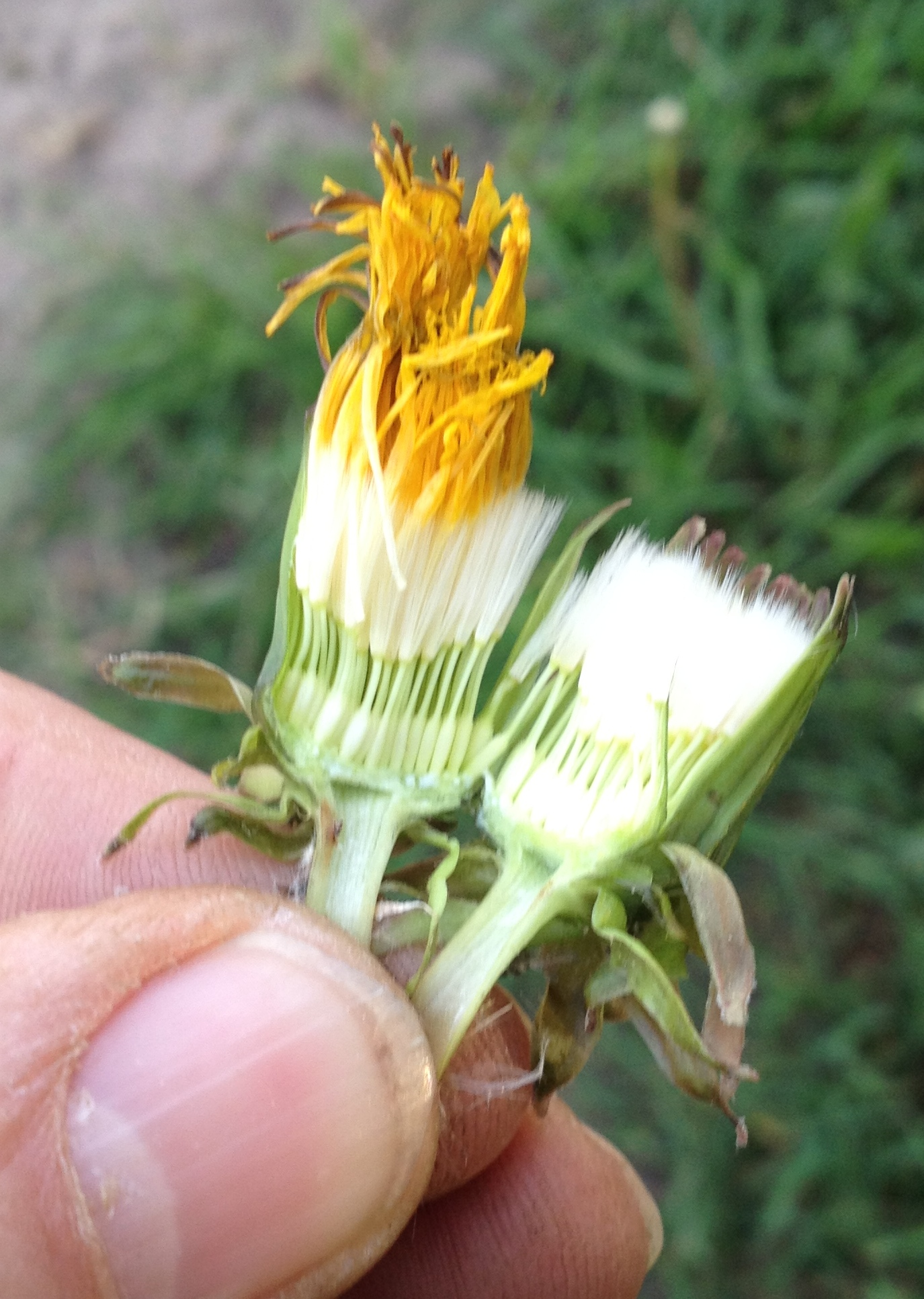 blütenstand aufgeklappt